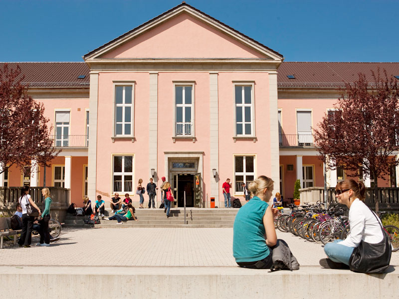 Im Verwaltungsgebäude befindet sich die Abteilung Studium und Lehre, die Personal- und Haushaltsabteilung sowie die Pressestelle und das Internationale Büro.